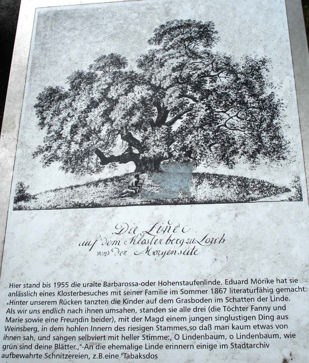 Tafel zur Erinnerung an die Barbarossa-/Hohenstaufen-Linde bei Lorch